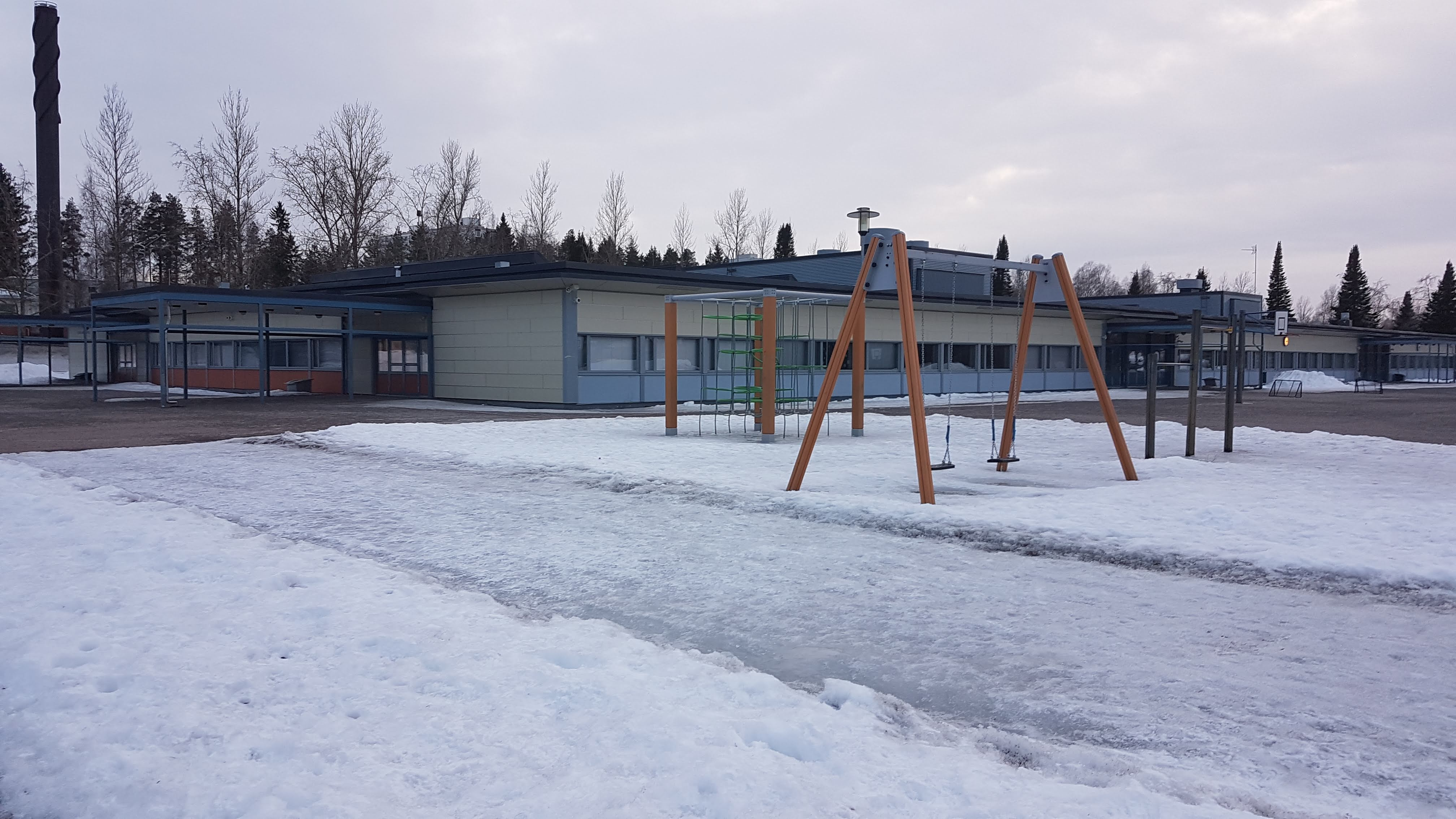 Eskolanmäen koulurakennus ala-asteen puolelta.